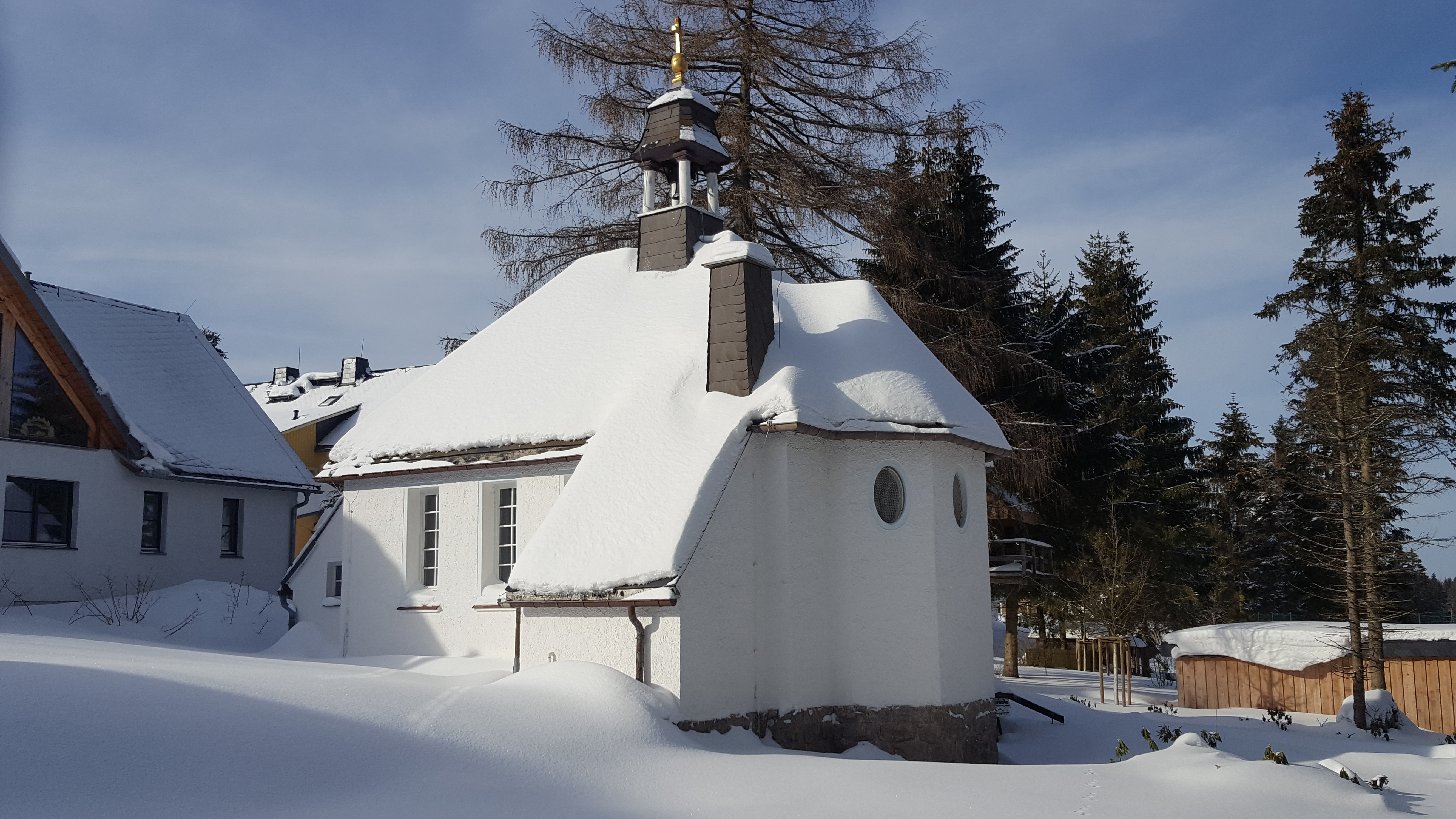 Oberbärenburg; Katholische Waldkapelle im Winter